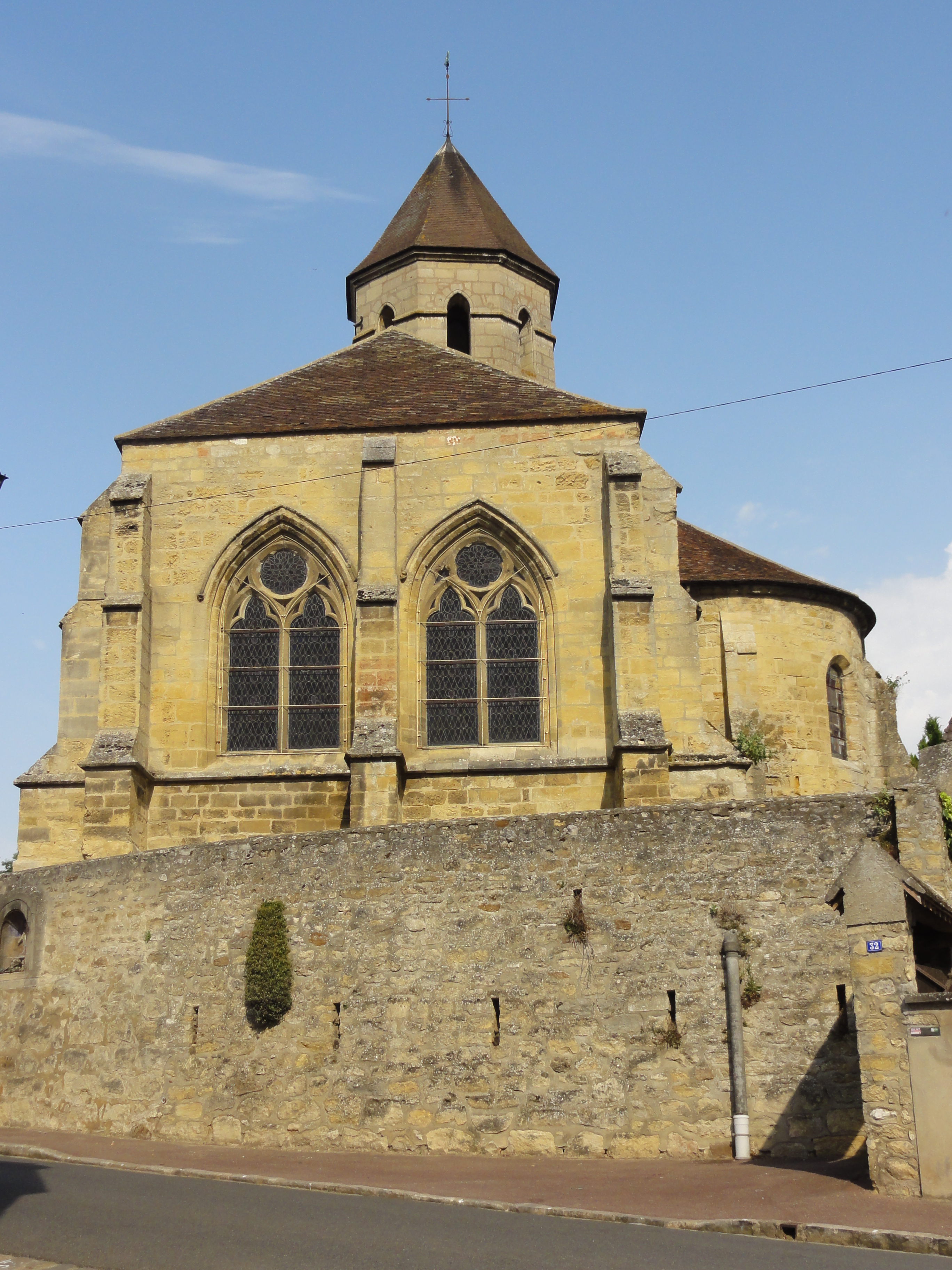 Église Saint-Pierre-ès-Liens de Condécourt (voir titre).